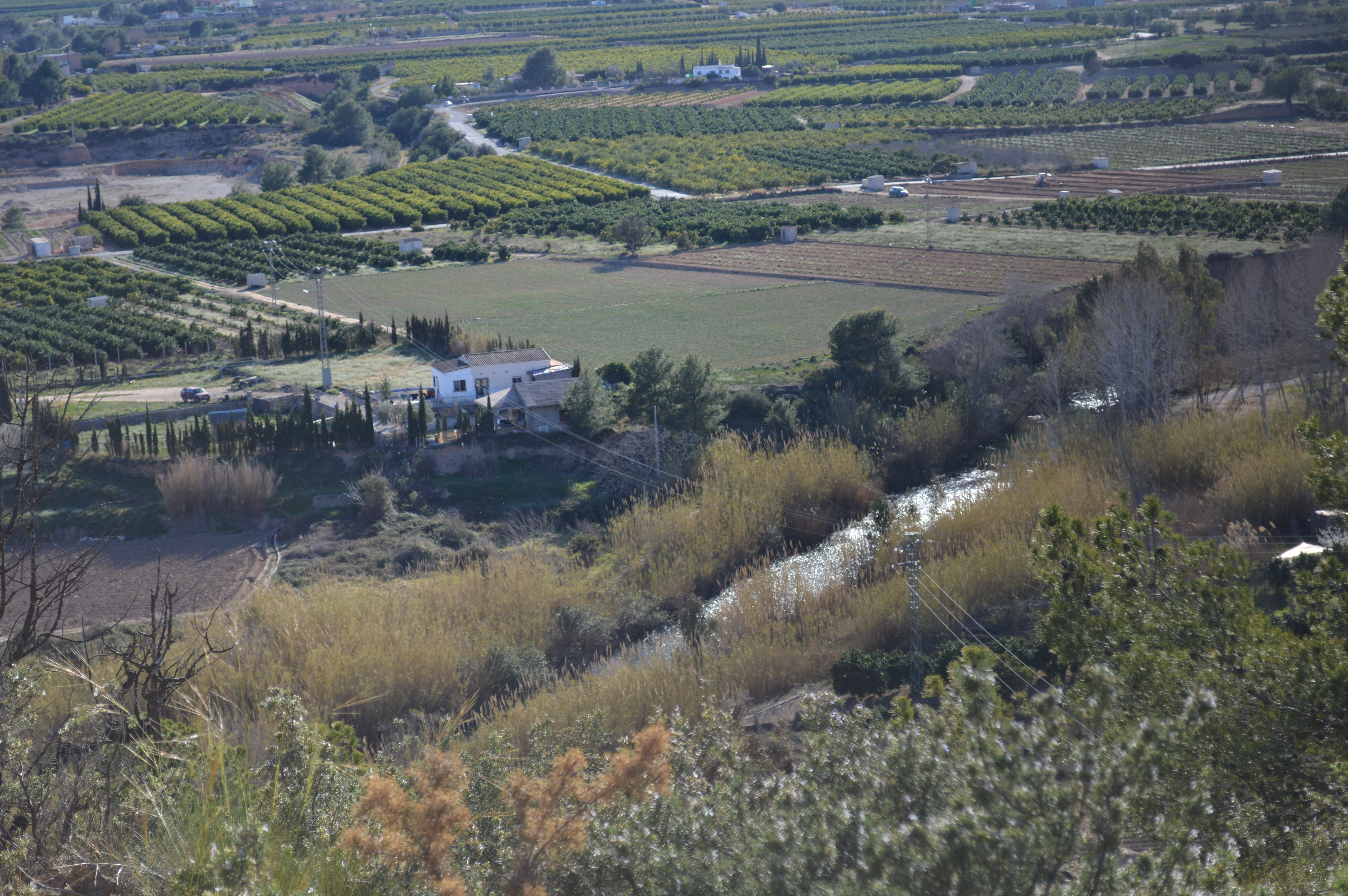 Se trata de una toma del paisaje de pedralba desde la zona de la ermita del pueblo.